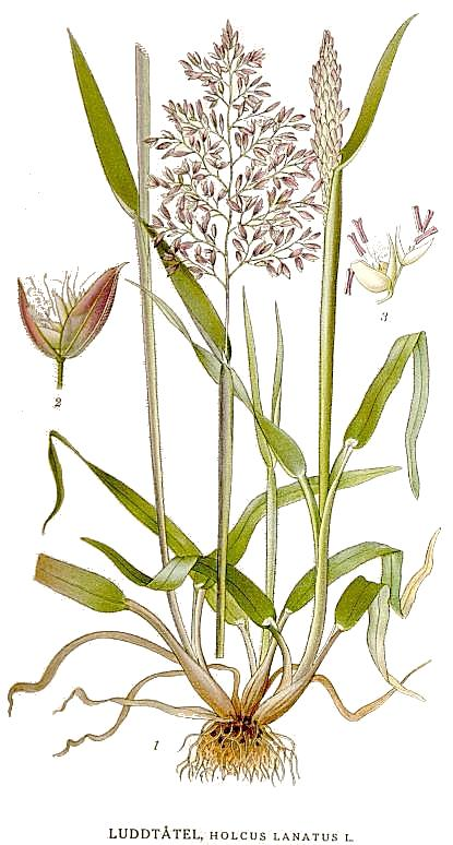 Holcus lanatus L. Original Description "Luddtåtel", Holcus lanatus L.